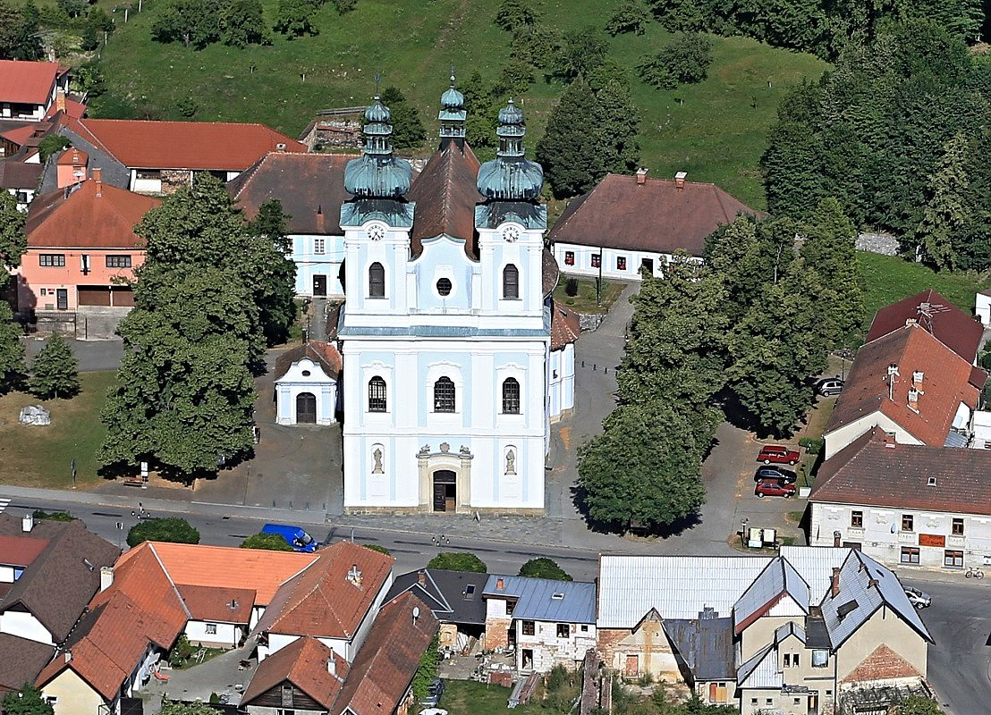 Pozdně barokní kostel Panny Marie Bolestné z 18. století.